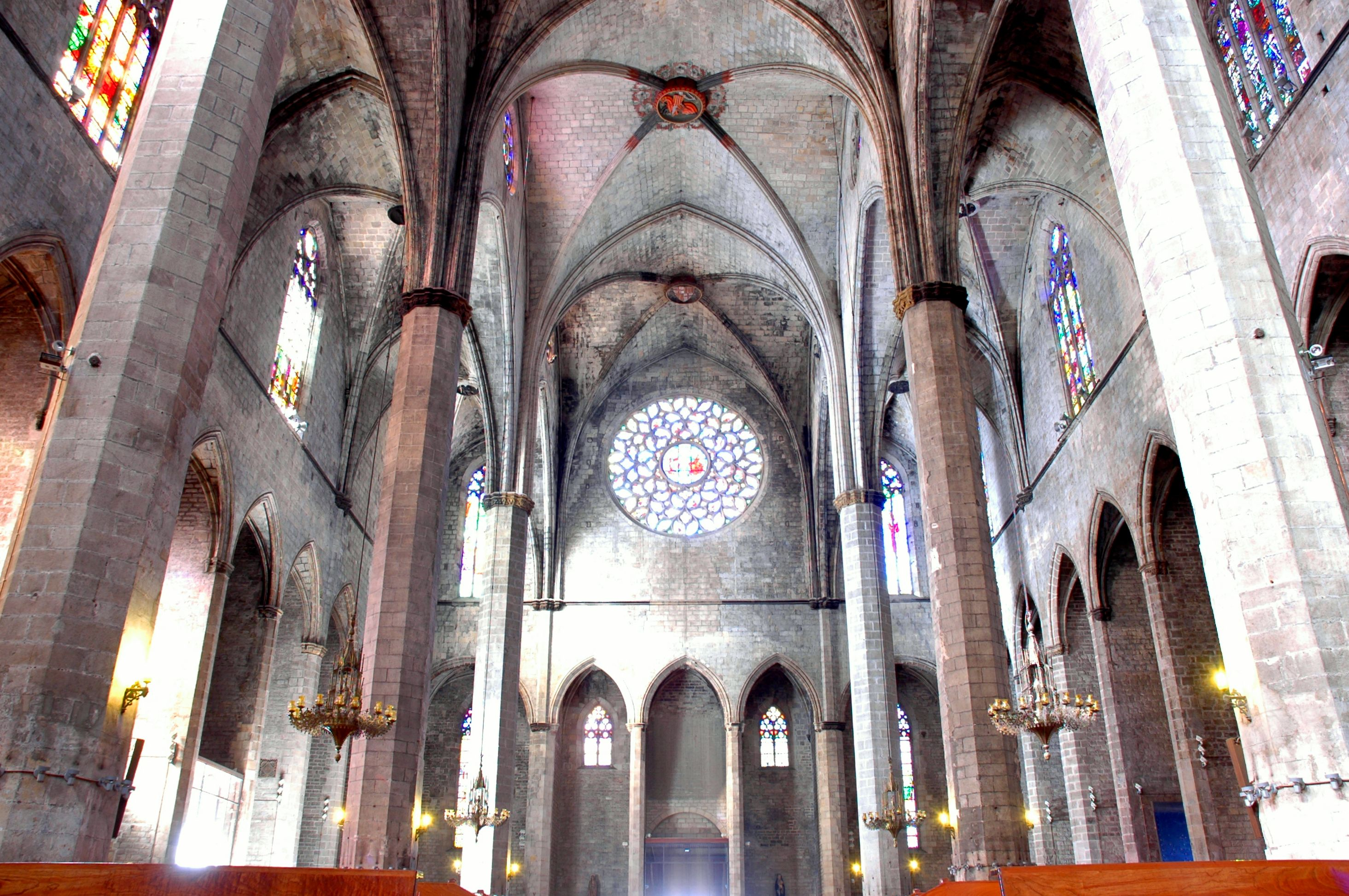 Santa Maria del Mar - Interior rosassa